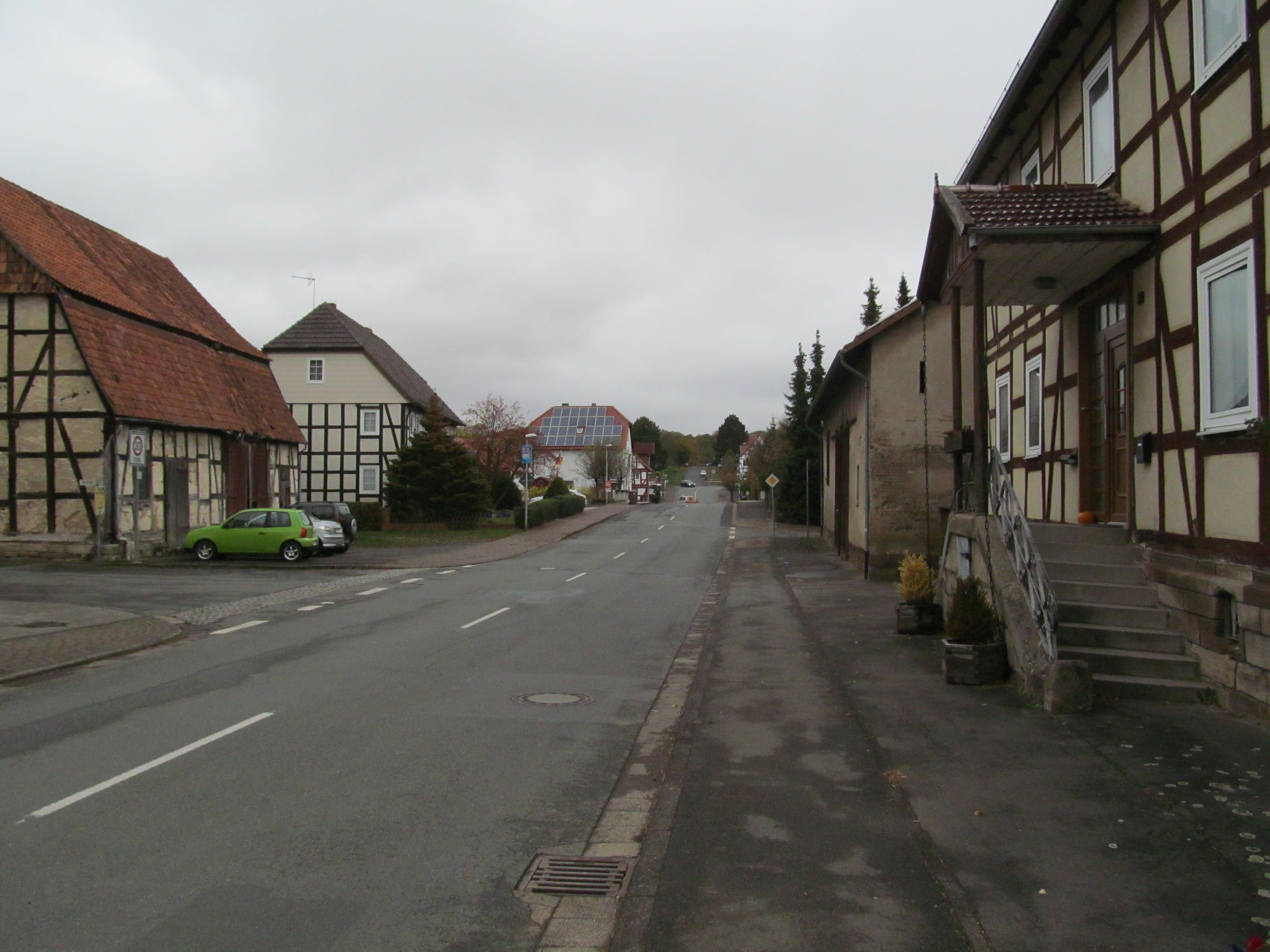 die Warburger Straße in Obermeiser, Blick von der Einmündung der Straße Rische nach Westen